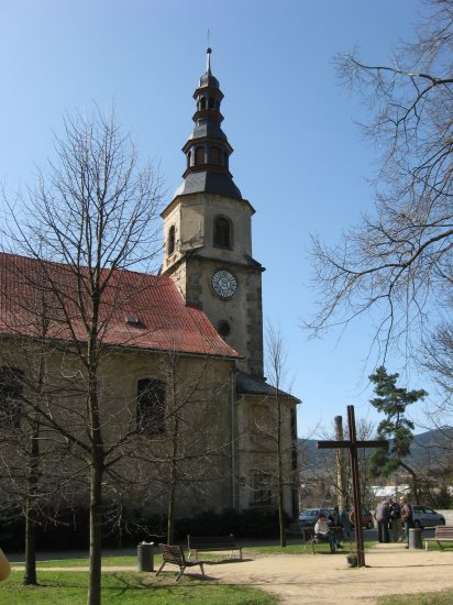 Kostel sv. Jana Křtitele, Na Žižkově, Liberec VI-Rochlice.